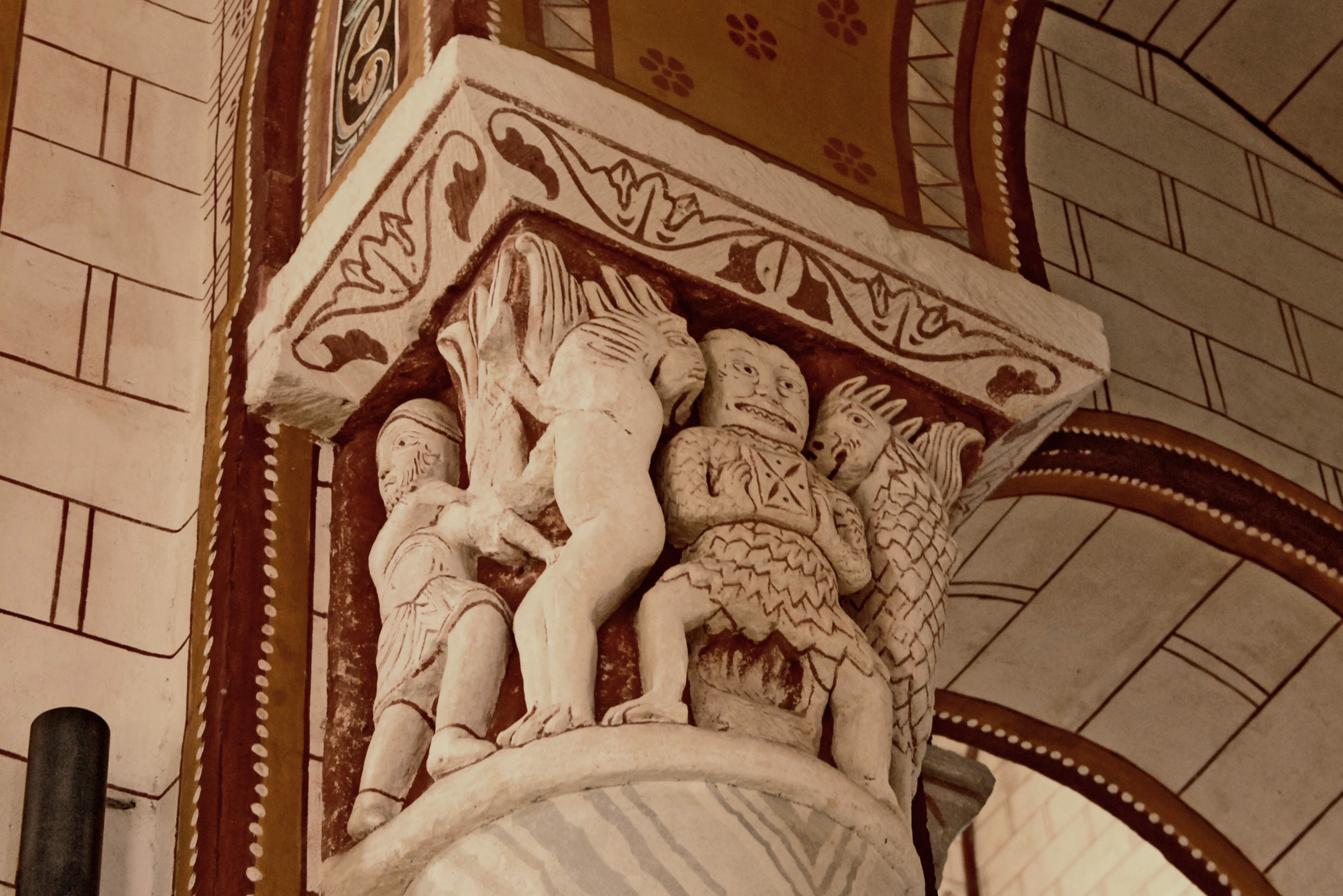 Kapitell VIII